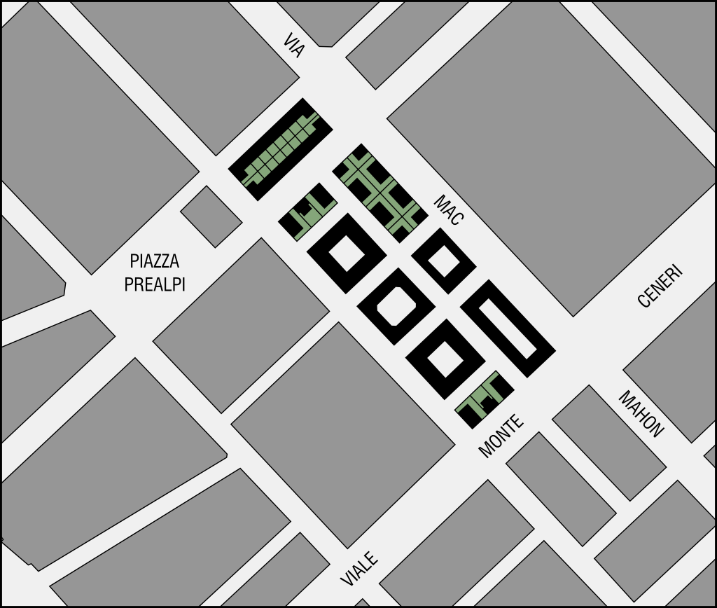 Mappa del quartiere Mac Mahon a Milano.